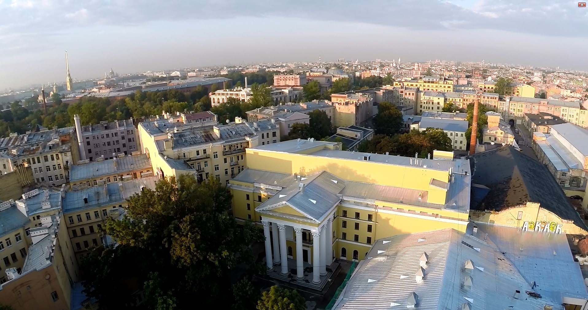 Ленфильм, вид сверху